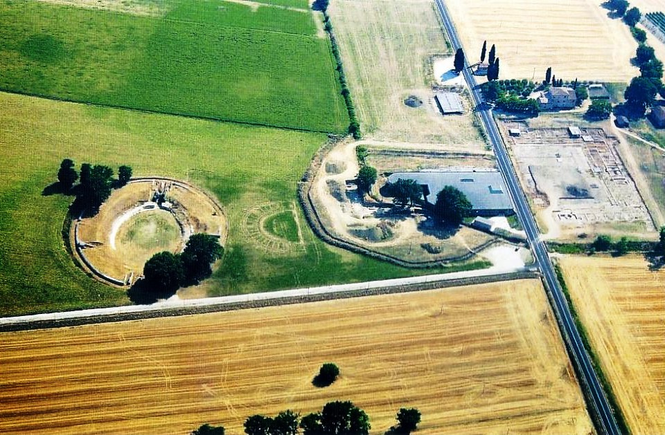 Suasa, veduta aerea della città